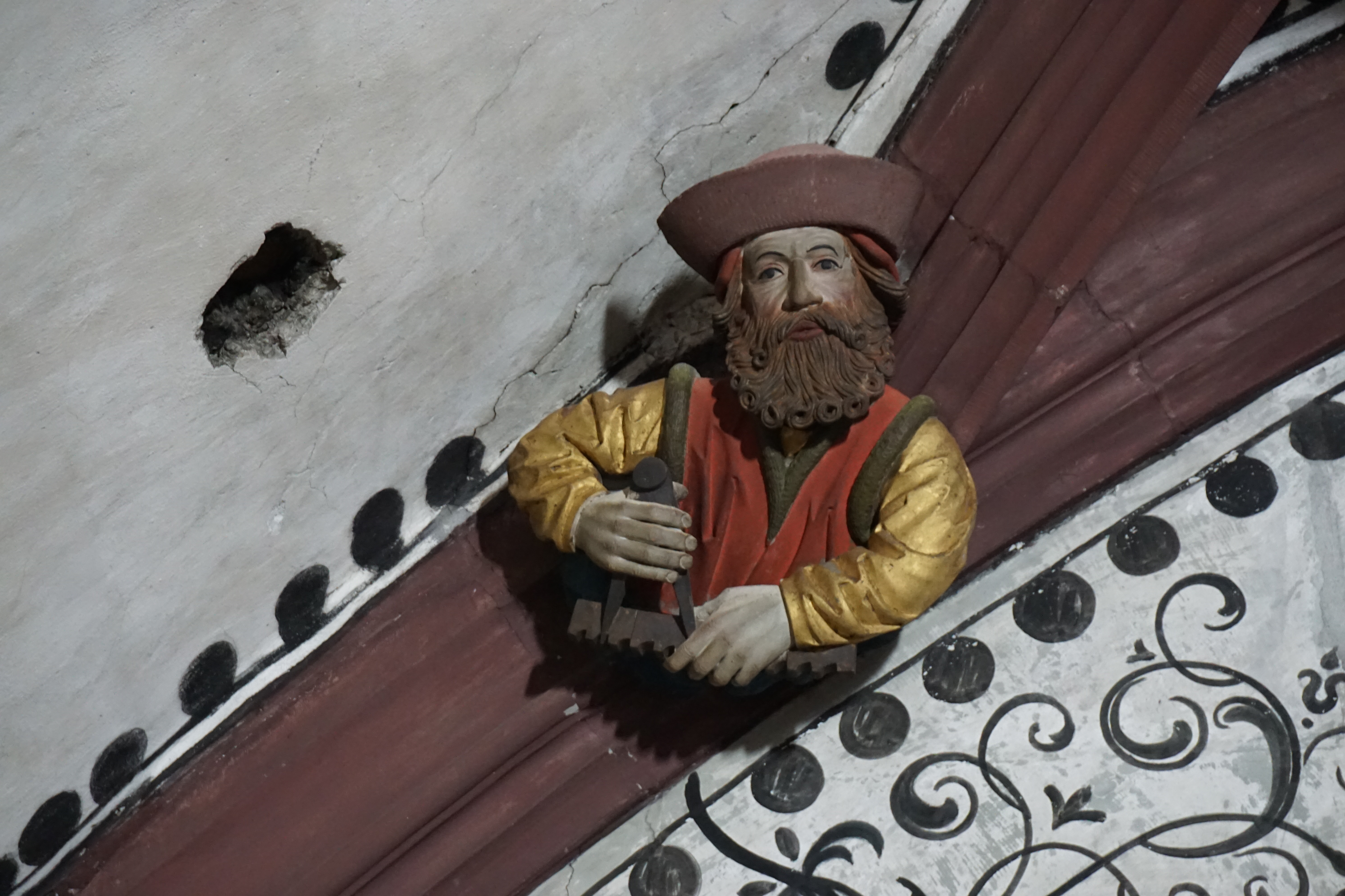 Figur des Werkmeisters Hl. Semproniamus, Einer der vier Gekrönten